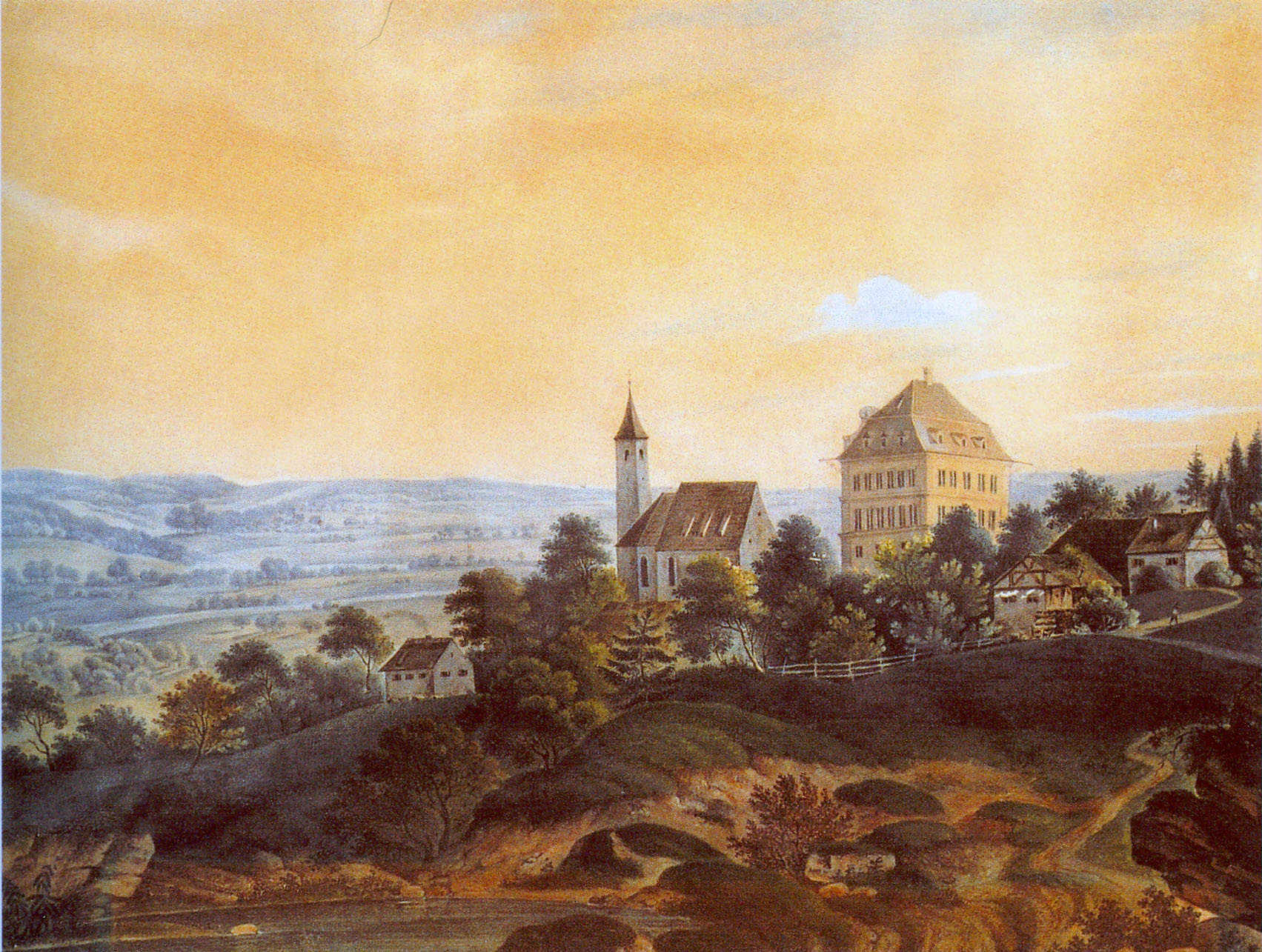 Offingen Ölgemälde